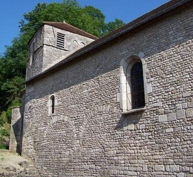 Église Saint-Léger d'Alise-Sainte-Reine